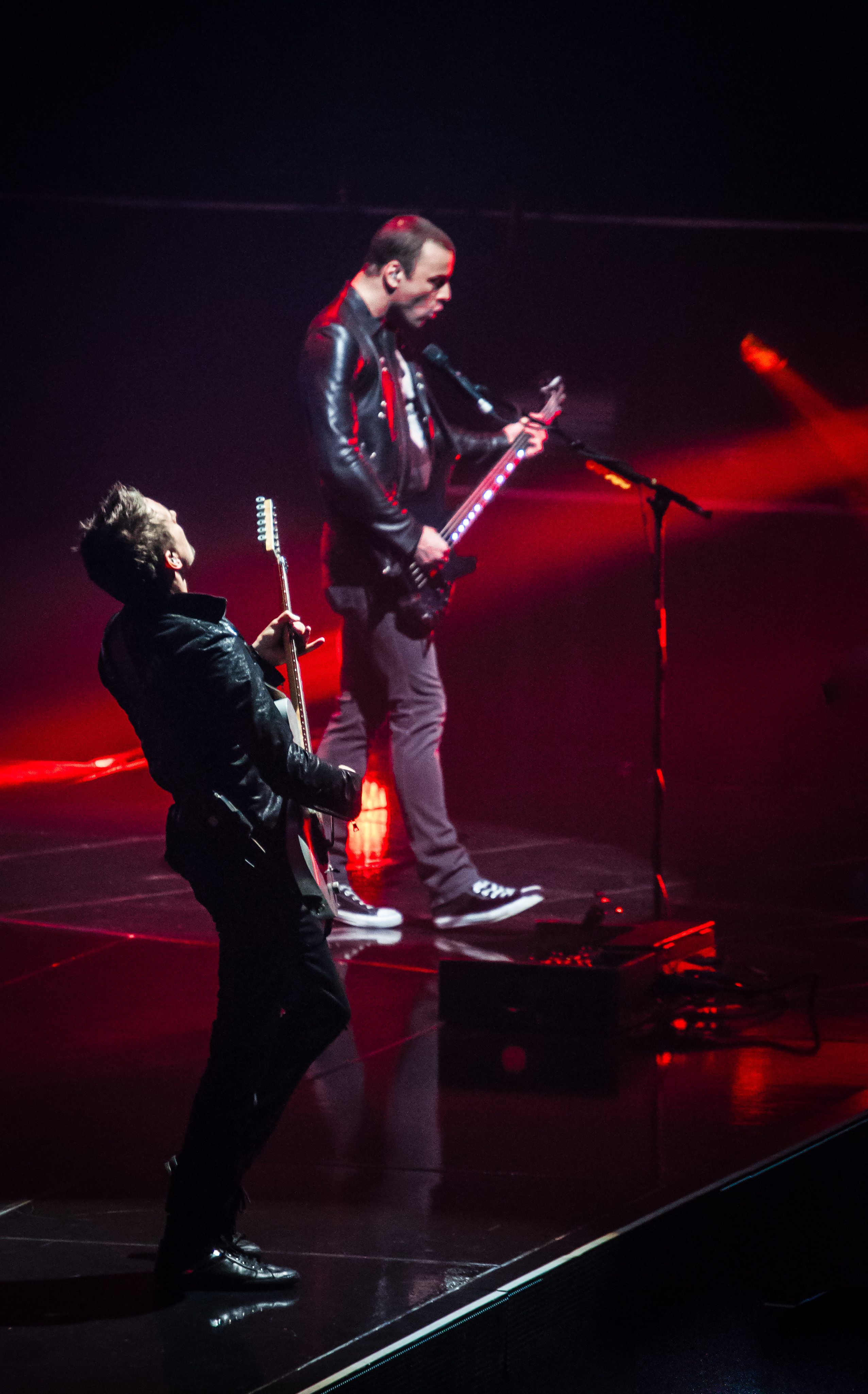 Matthew Bellamy en Christopher Wolstenholme tijdens een concert voor The 2nd Law Tour in het Air Canada Centre op 10 april 2013.